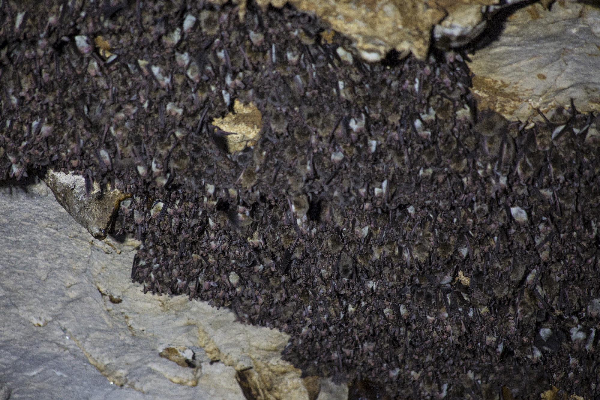 ღლიანას მღვიმის ბუნების ძეგლი ღირსშესანიშნაობა: ქვედაცარცულ კირქვებში გამომუშავებულ მღვიმეს ორი შესასვლელი გააჩნია; პირველი - საიდანაც ძირითადი მიწისქვეშა ნაკადი გამოდის, სიმაღლით 3.5-4 მ, ხოლო სიგანე 7 მ-ია; მარცხენა განშტოება მთავარი შესავლელიდან 35-40 მ-ის დაშორებით ციცაბო საფეხურებით ზედაპირზე ამოდის. აქედან 60 მეტრში ფსკერი 50 მ სიგრძის სიფონურ ტბას უკავია, რომლის სიგანე 3-4 მ, ხოლო ჭერის სიმაღლე 2,5 მ აღწევს. პირველ სიფონს 200 მ სიგრძის წყლიანი და უნაპირო დერეფანი აგრძელებს; აქ წყლის სიღრმე 0,5-2 მ-ია. წყლიან დერეფანს კვლავ სიფონური გალერეა მოსდევს, რომლის სიგრძე 30 მ, ხოლო სიგანე 1-2 მ-ია. იგი კვლავ 150 მ-იან გალერეაში გადადის, რომლის ჭერი თითქმის მთელ სიგრძეზე ნაღვენთი ფორმებითაა დაფარული. ეს წყლიანი გალერეა მღვიმის ბოლომდე კვლავ რამდენიმე სიფონურ გასასვლელს ივითარებს, ხოლო ბოლოში 20-30 მ სიგრძეზე ჭერის დადაბლების გამო გადაადგილება ძალზე გაძნელებულია. ღლიანას მიწისქვეშა დინების დებეტია 50-55 ლ/წმ (წყალმცირობისას), ეს ნაკადი მღვიმიდან გამოსვლის შემდეგ, მდ. ყუმის ვოკლუზურ წყაროებს უერთდება. მღვიმის მშრალ დერეფნებში ღამურების მრავალრიცხოვანი კოლონია ბინადრობს. მდებარეობა: წყალტუბოს მუნიციპალიტეტი, სოფ. ყუმისთავი, პრომეთეს მღვიმის მიმდებარედ, 142 მეტრი ზღვის დონიდან. კოორდინატები: N42 22.338 E42 35.842